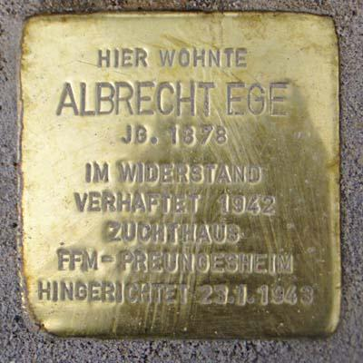 Stolpersteinlage Am Treutengraben 3 für Albrecht Ege Freigabe für Commons-Wikimedia erteilt von Initiative Stolpersteine Frankfurt am Main e.V.